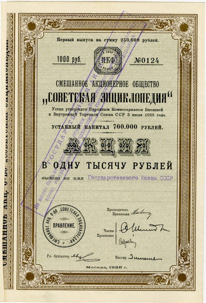 Акция в 1000 руб., выданная на имя Госбанка СССР, смешанного акционерного общества "Советская энциклопедия". Москва, 1928 г.